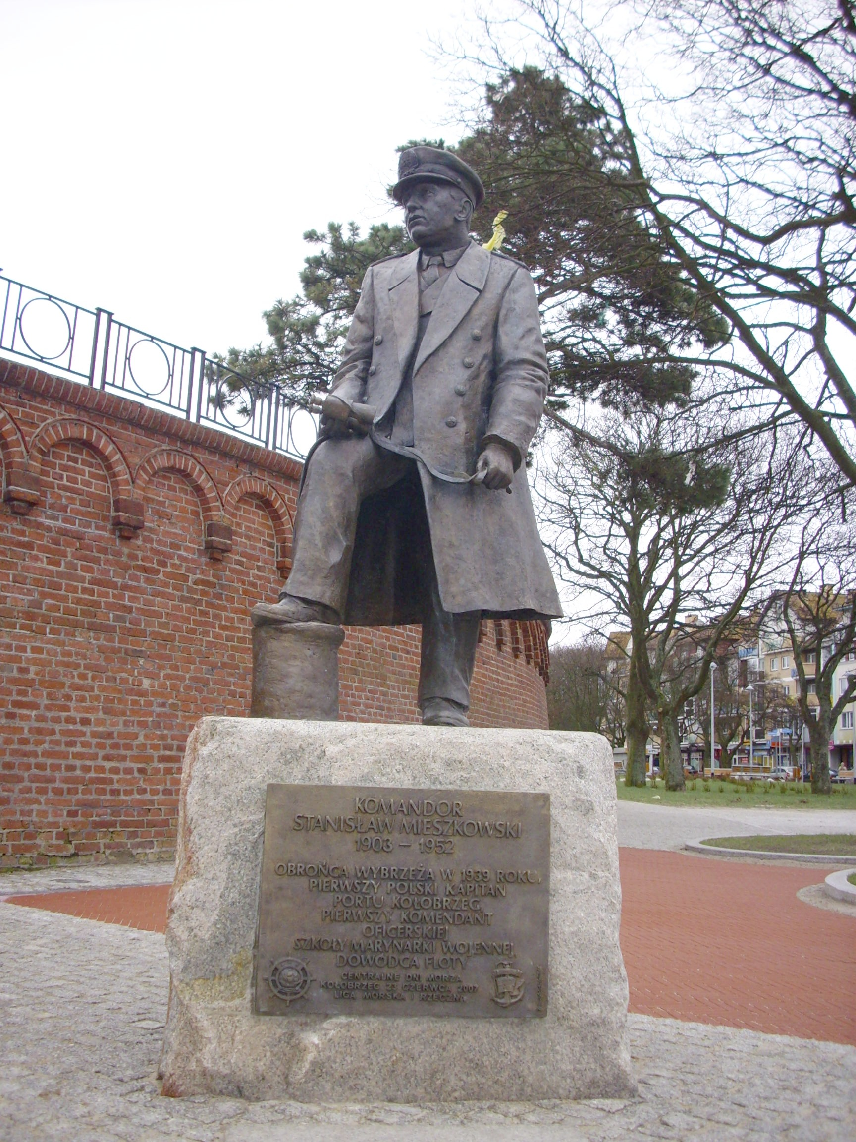 Kołobrzeg. Port. Pomnik komandora Stanisława Mieszkowskiego.